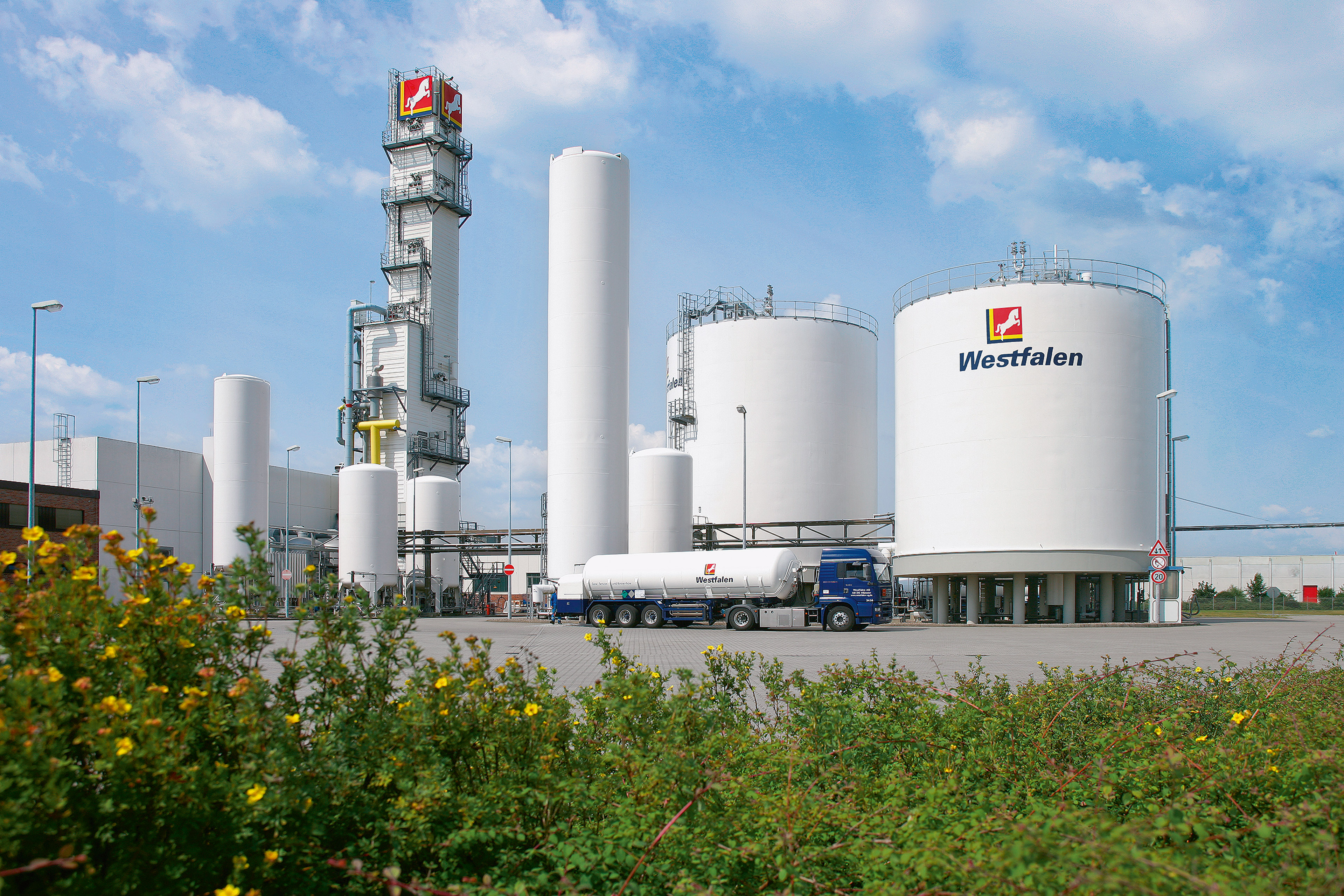 Westfalen-Werk in Hörstel, Kreis Steinfurt, Nordrhein-Westfalen, Deutschland.